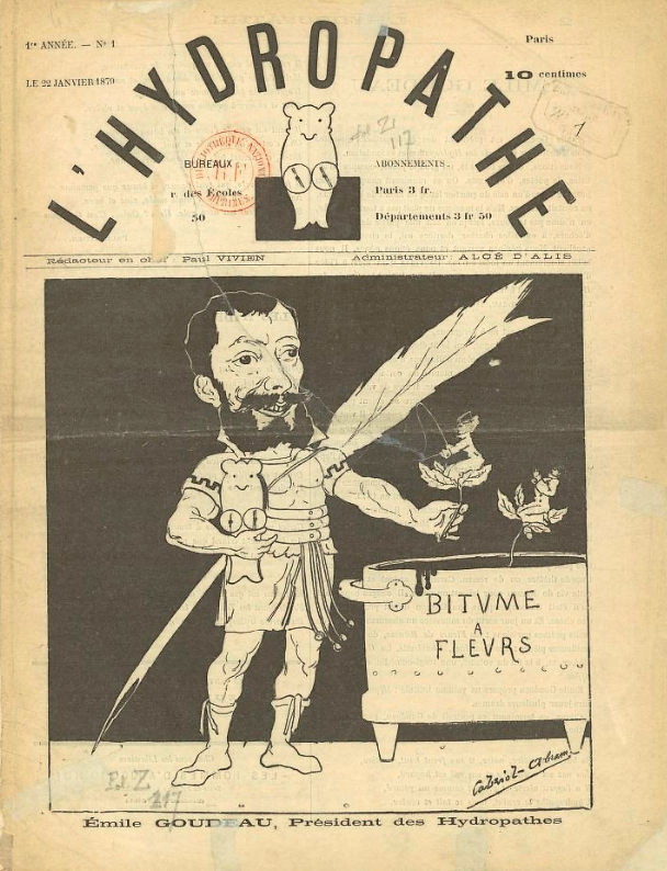 L'Hydropathes, n°1 du 22 janvier 1879. Émile Goudeau caricature de Cabriol (Georges Lorin). Numérisation sur le site Gallica